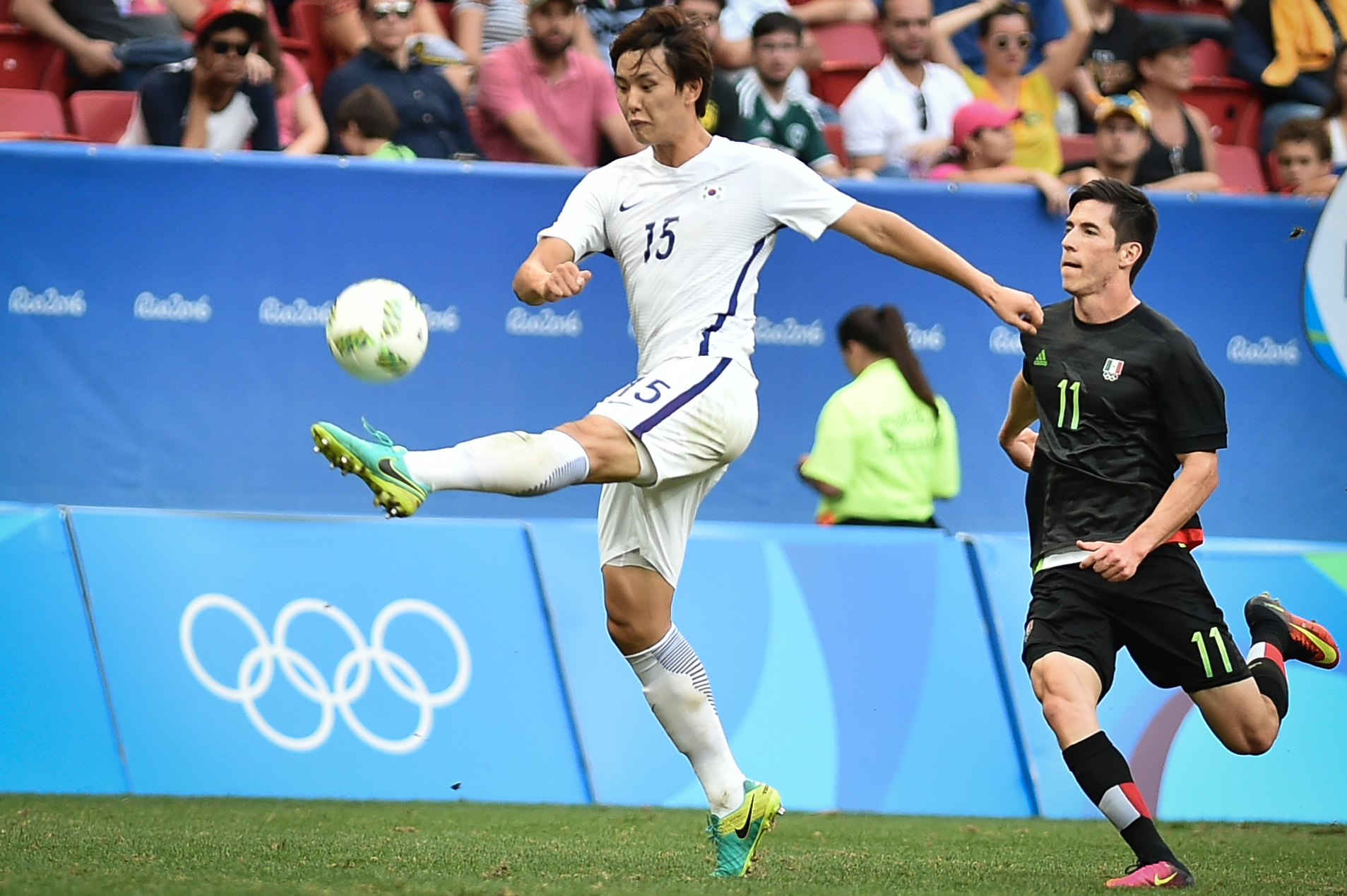 Estádio Nacional de Brasília Mané Garrincha, Brasília, DF, Brasil, 10/8/2016 Foto: Andre Borges/Agência Brasília. O time da Coréia do Sul classificou-se para a próxima fase do torneio de futebol masculino da Olimpíada com uma vitória por 1 a 0 contra o México. Kwon Chang-hoon marcou o gol da vitória sul-coreana aos 32 minutos do segundo tempo.